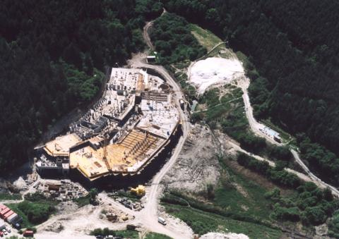 Egerszalók, Hungary, aerialphotography